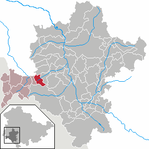 Oberkatz in Thuringia - District Schmalkalden-Meiningen